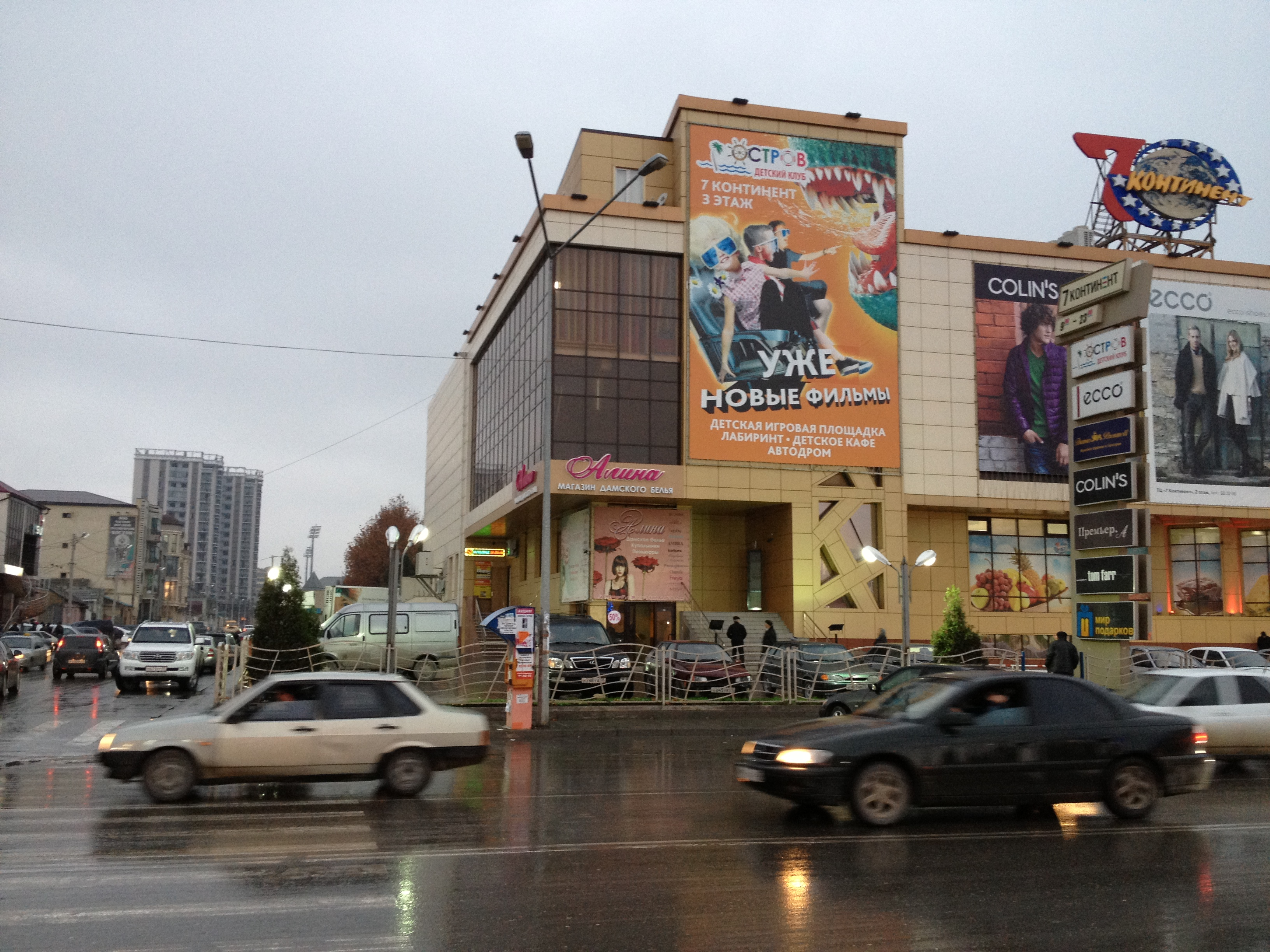 Махачкала, ТЦ 7 континент